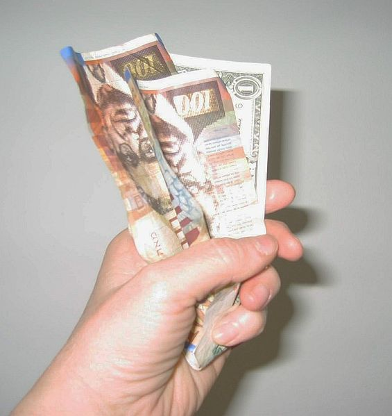 למי שלא יודע איך נראה כסף. צולם על ידי.